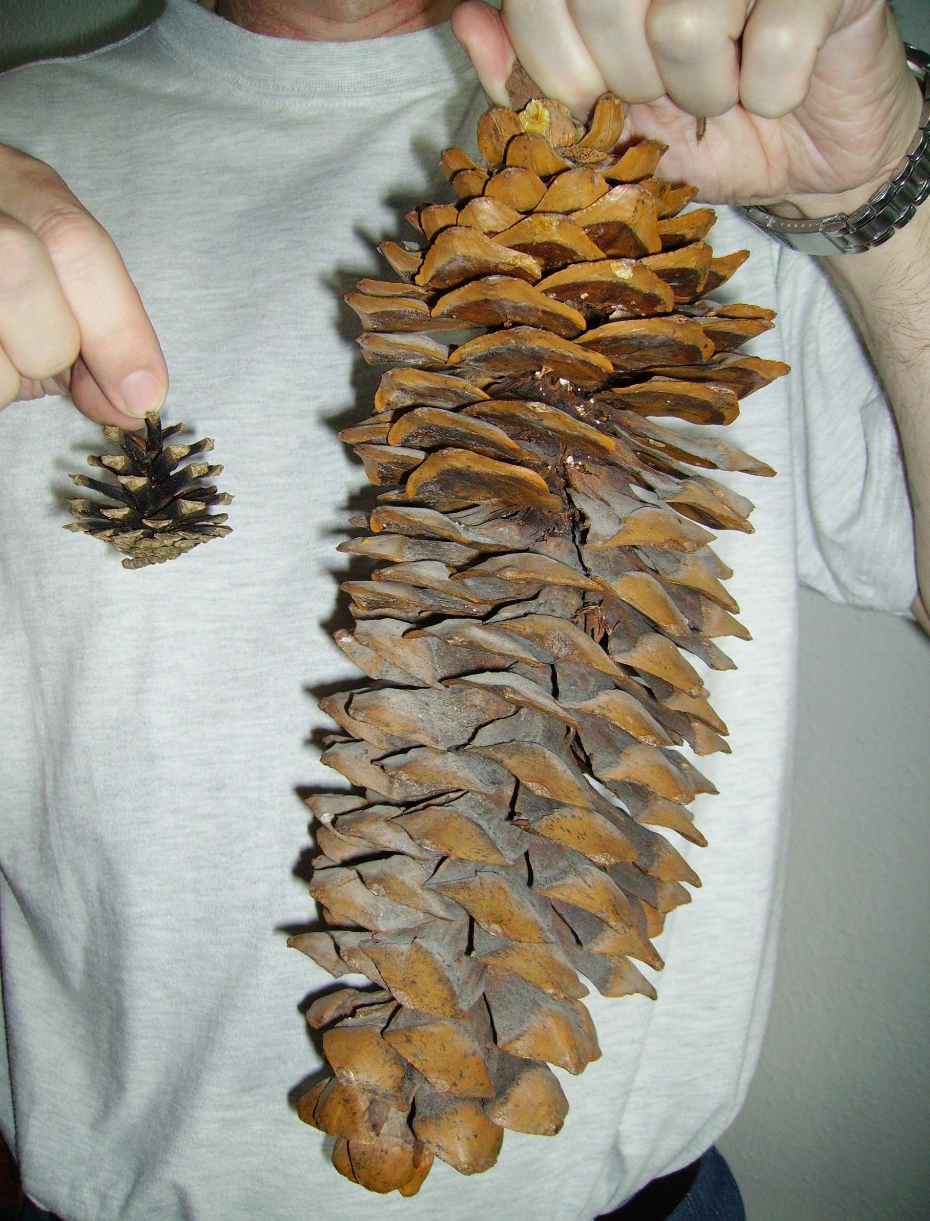 Ein grosser (Pinus lambertiana) und ein kleiner (Pinus sylvestris) Zapfen